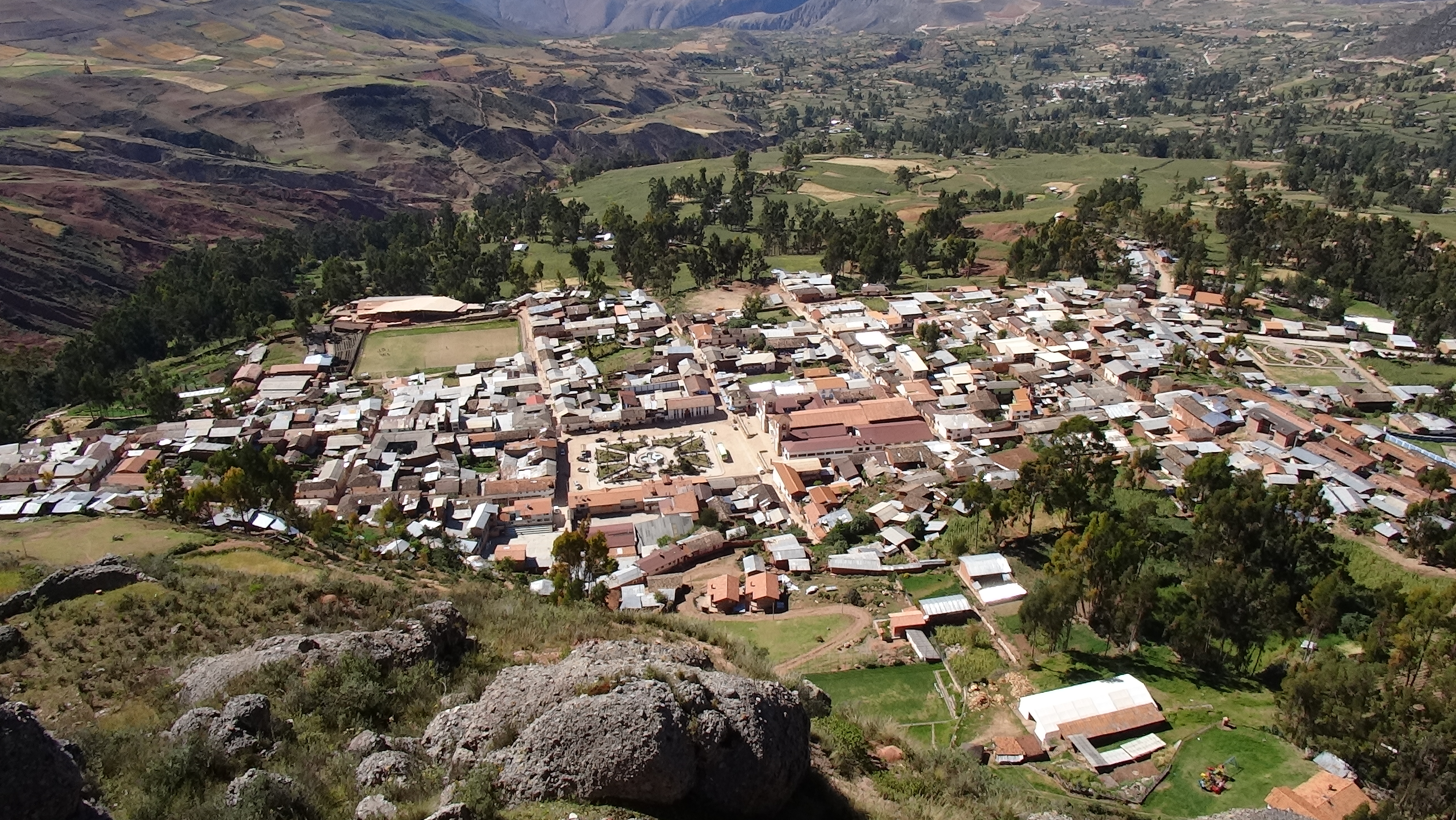 Vista de Llamellín desde el cerro Pahuacoto.